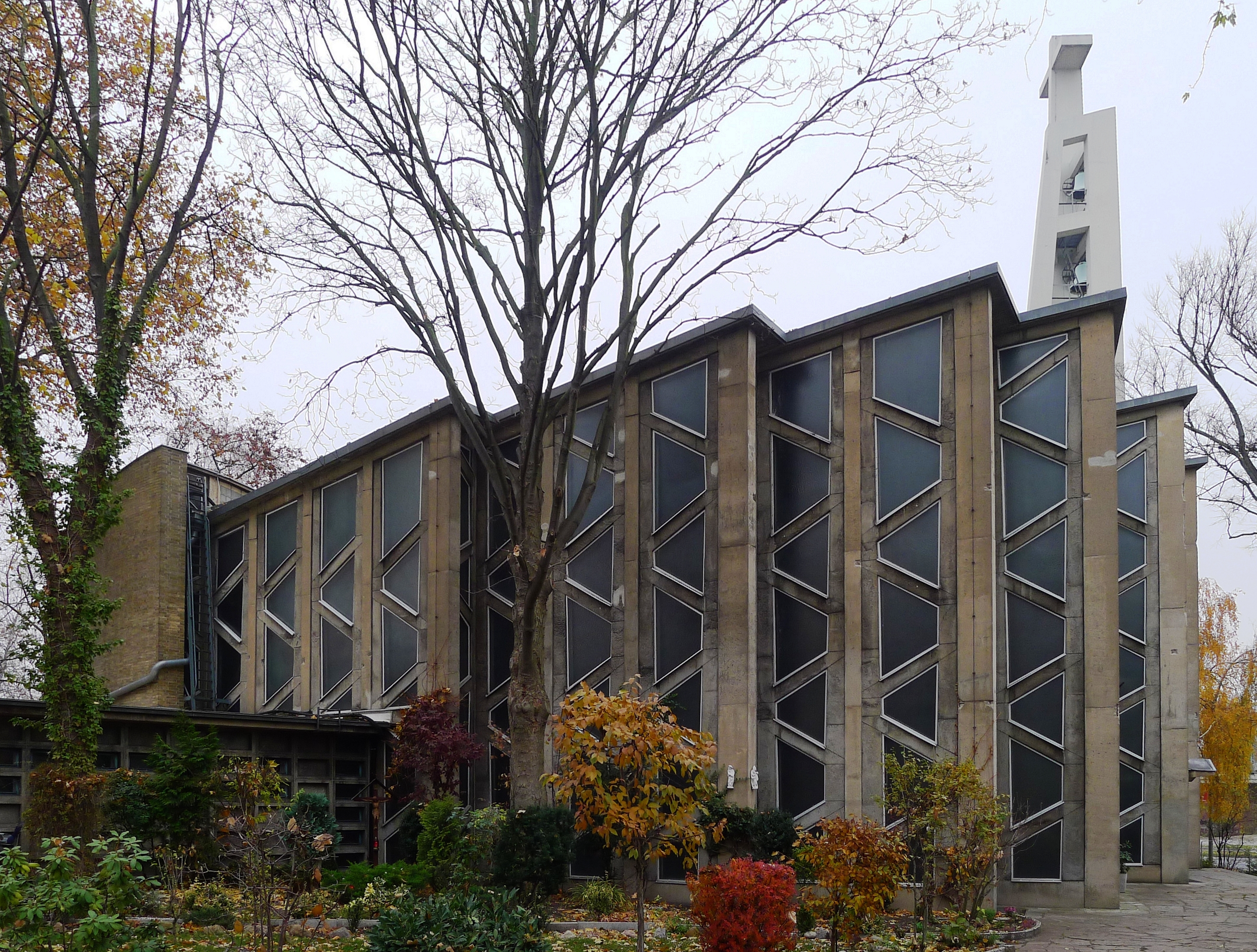 Blick auf die Kirche von der Klopstockstraße